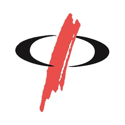 Logo del Col·legi de Periodistes de Catalunya